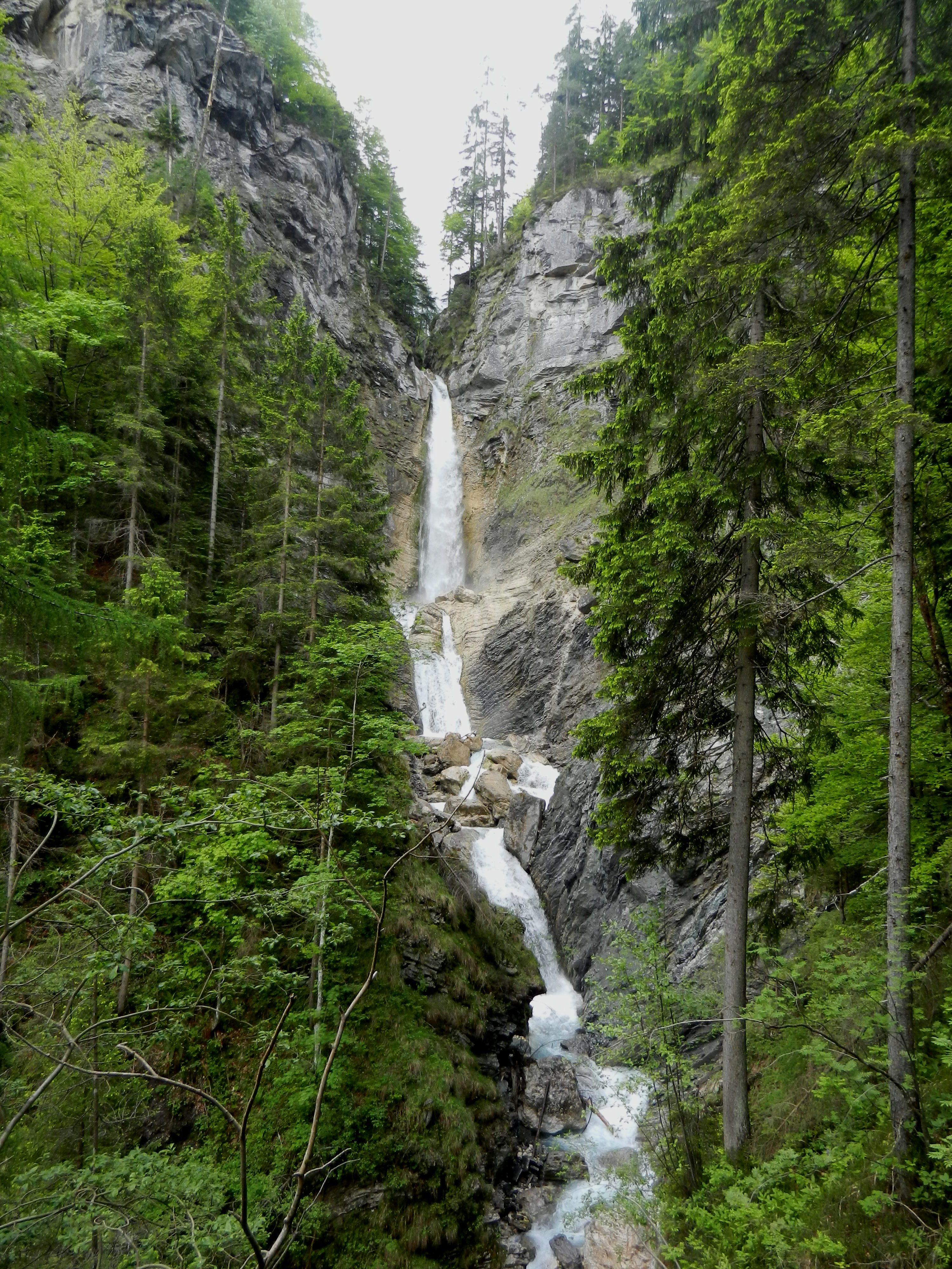 Spodnji Martuljški slap